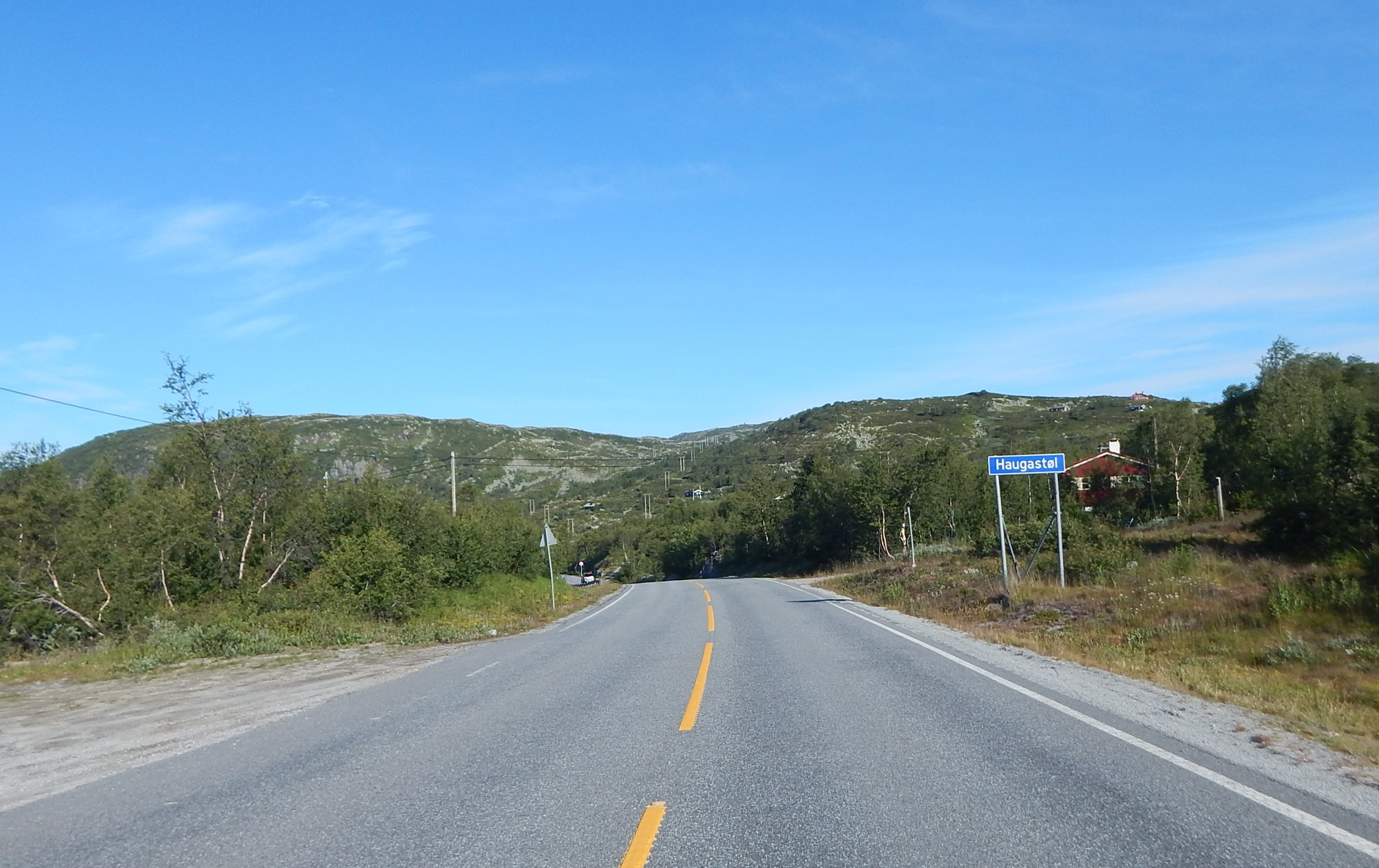 Riksvei 7 ved Haugastøl